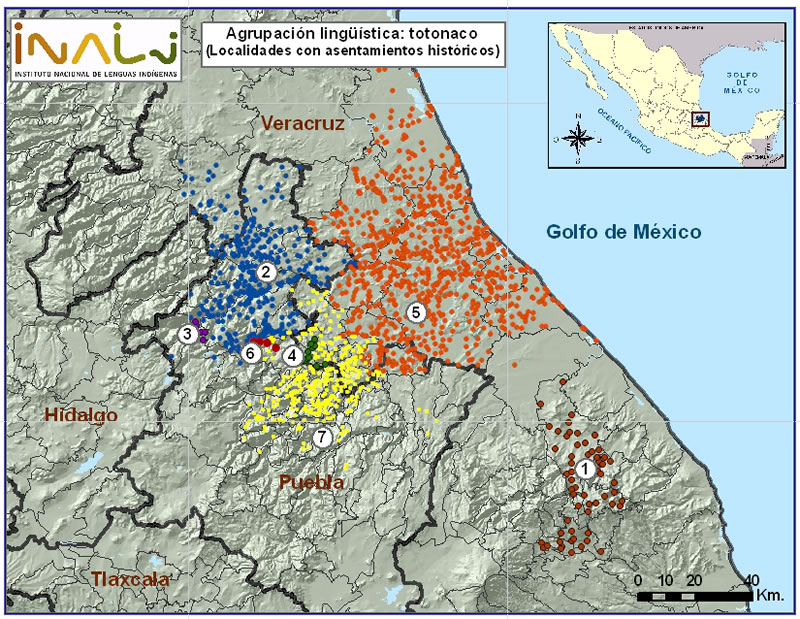 1. Totonaco del sureste/ laakanaachiwíin 2. Totonaco central del norte/ tachaqawaxti / tutunakuj/ tachiwiin no inm 3. Totonaco del cerro Xinolatépetl/ kintachiuinkan 4. Totonaco central alto/ tutunáku (central alto) no inm 5. Totonaco de la costa/ lichiwintutunaku 6. Totonaco del río Necaxa/ totonaco (del río Necaxa) 7. Totonaco central del sur/ tutunáku(central del sur)/ tutunakú/ totonaco (central del sur)